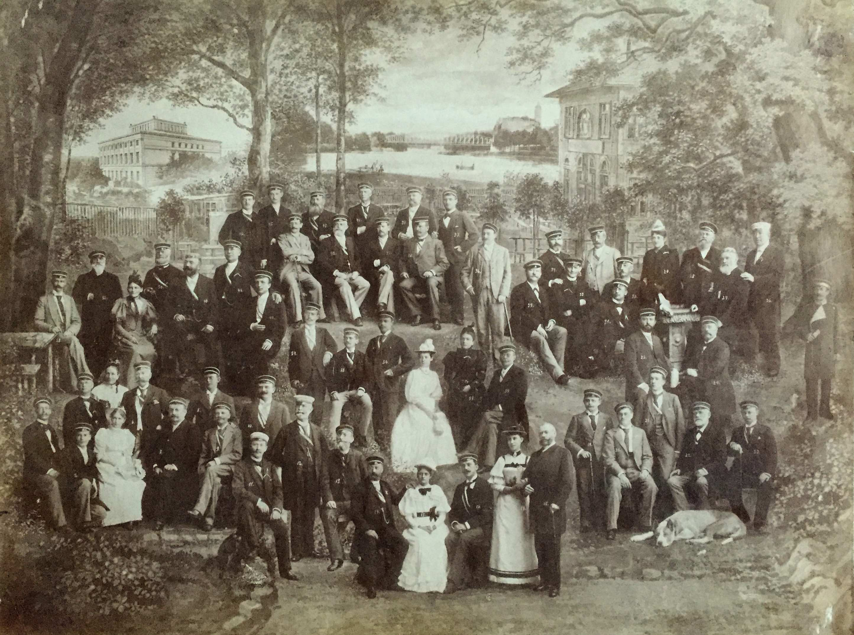 Foto der Teilnehmer des 90. Stiftungsfestes des Corps Saxonia Halle 1894.